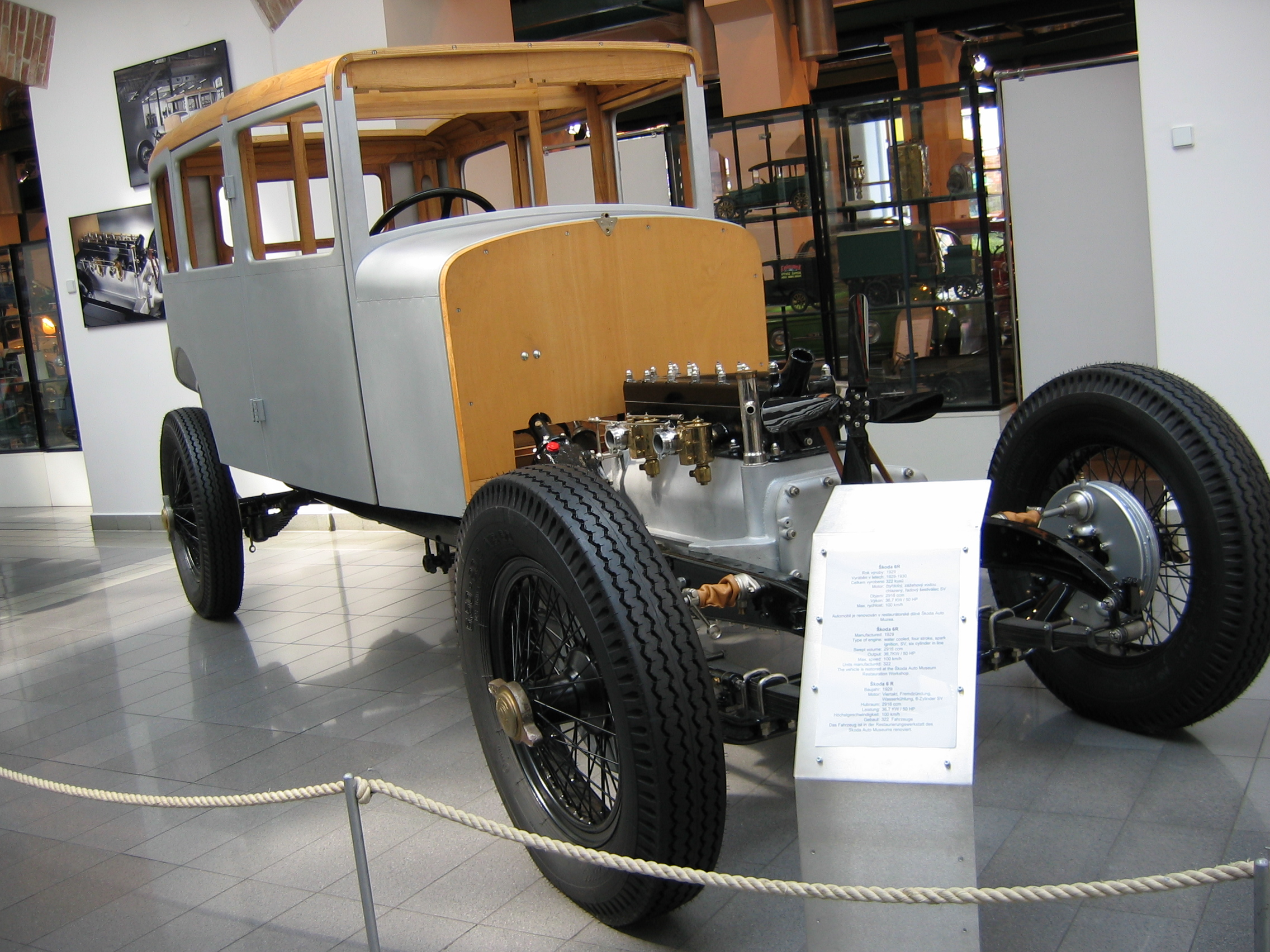 Škoda 6 R - Škoda Auto Museum, Mlada Boleslav